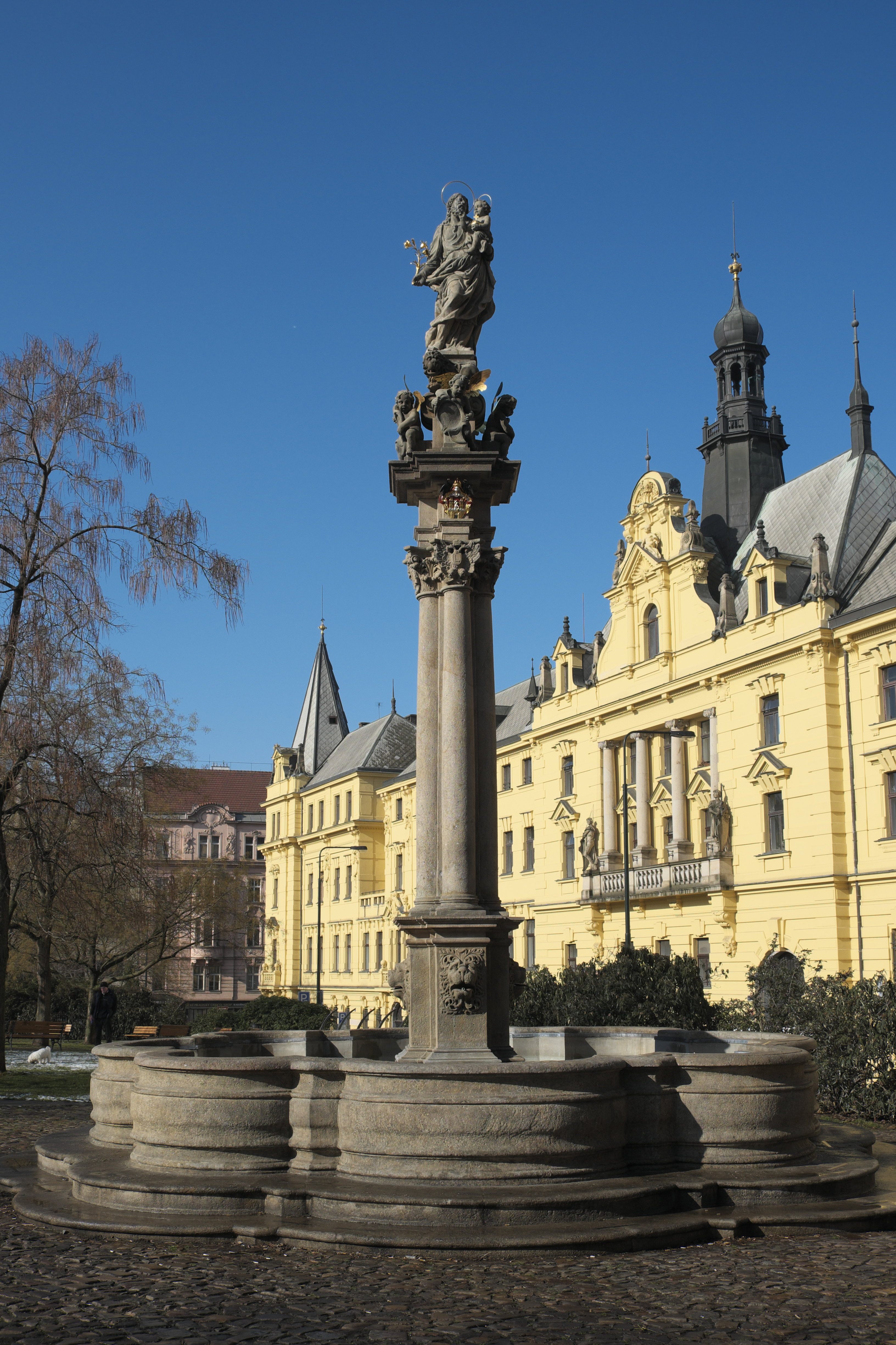 Karlsplatz in der Prager Neustadt (Tschechien), Josephssäule